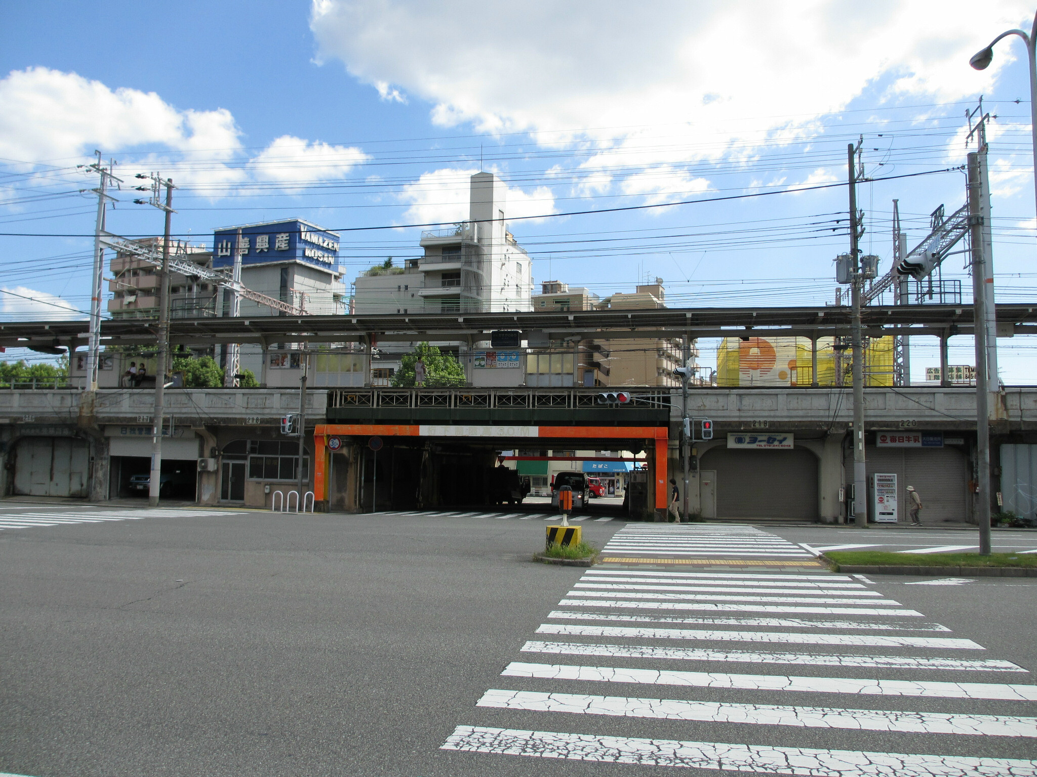 Hankyu Kasuganomichi Station